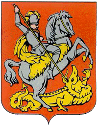 Dawny herb (1682) miasta Biały Kamień